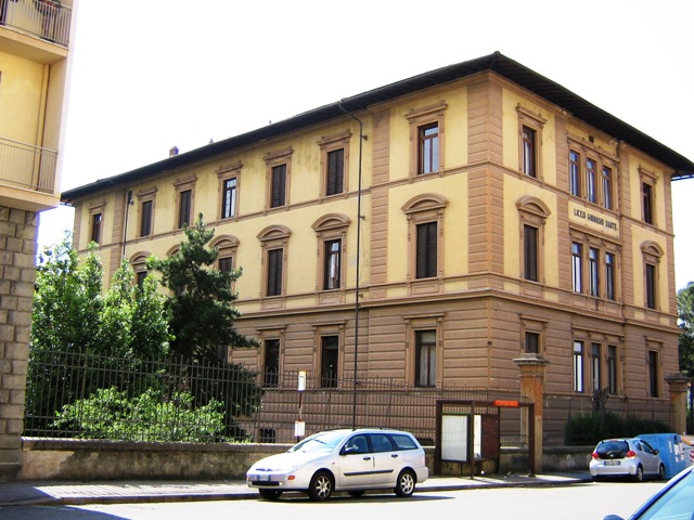 Foto del Liceo-Ginnasio Dante